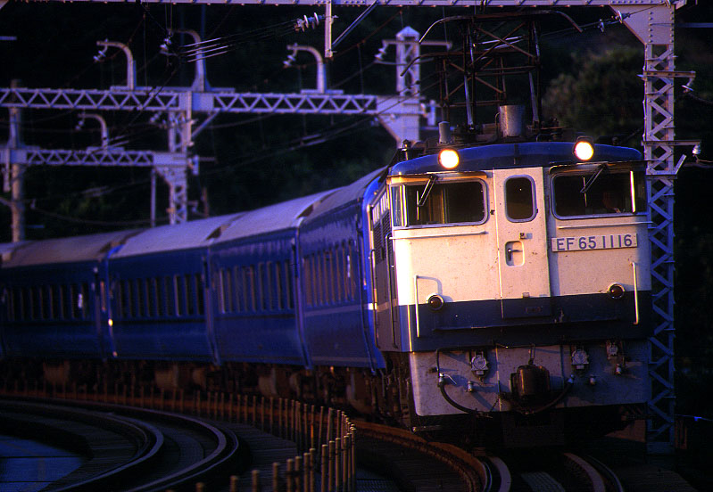 寝台急行 銀河 東海道本線 根府川〜早川 2000年8月11日